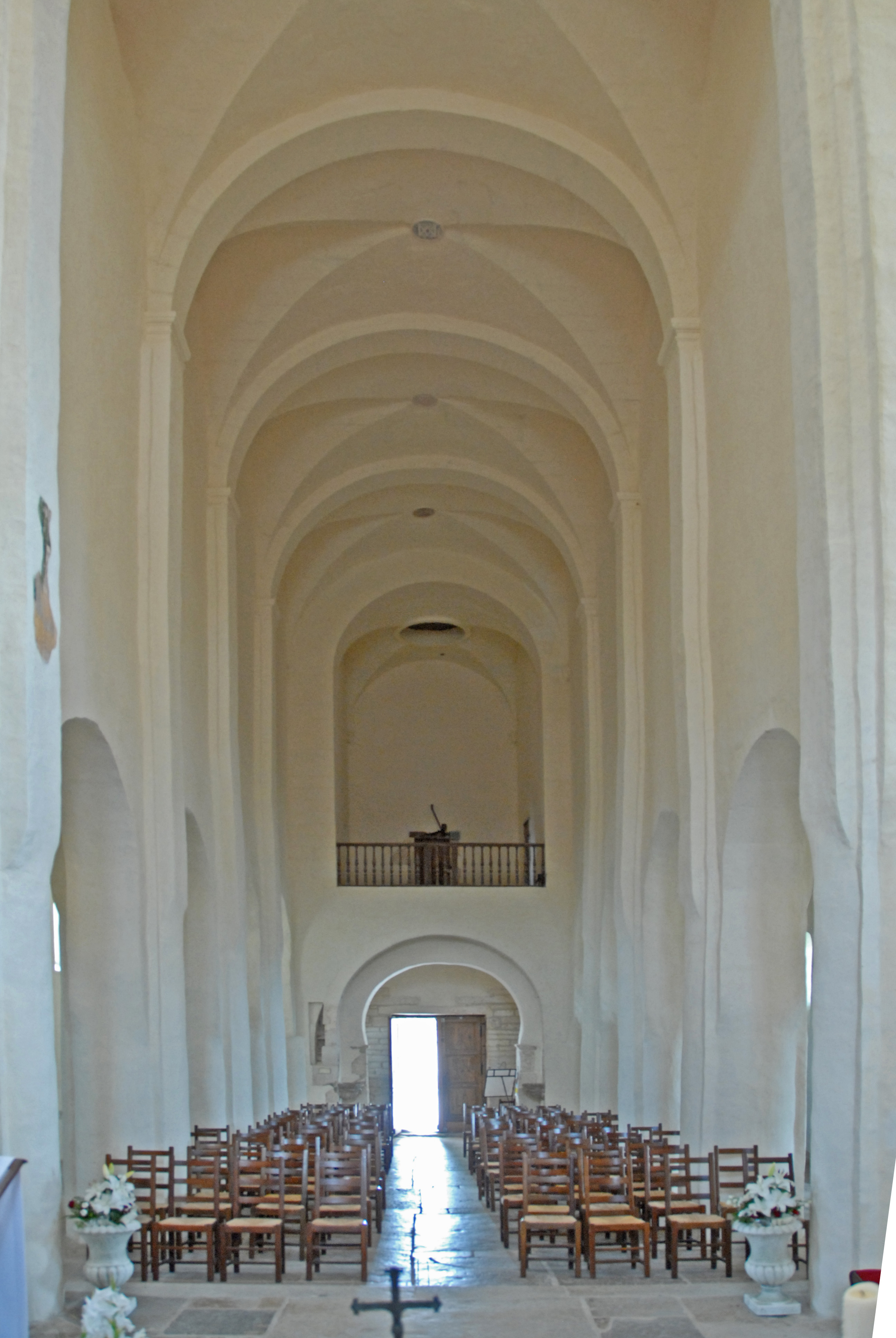 St-Vorles de Châtillon-s-S, Mittelschiff nach hinten